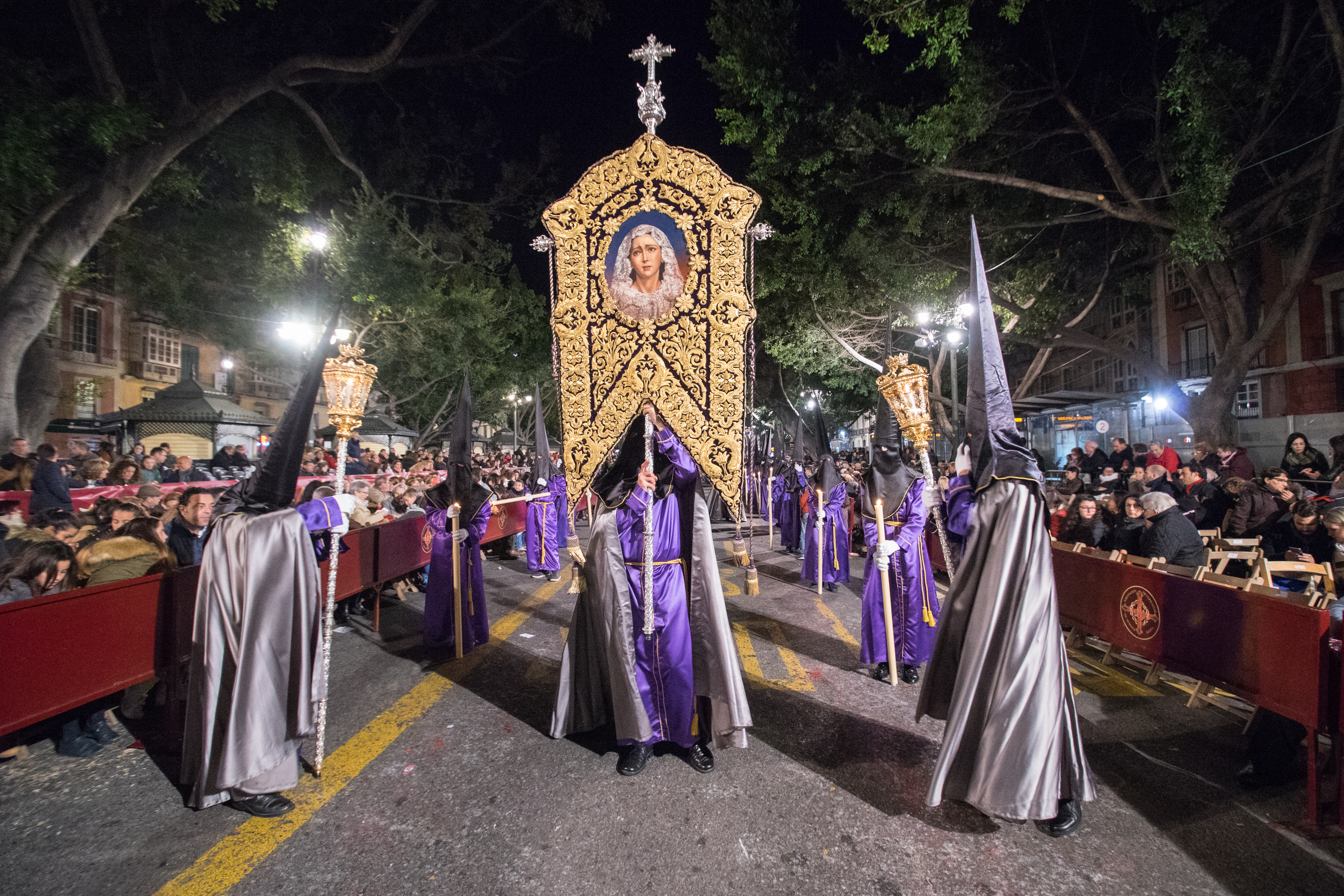 Estandarte de la Real, Piadosa y Venerable Hermandad de Culto y Procesión de Nuestro Padre Jesús del Rescate y María Santísima de Gracia This is a photography of a Folklore festival in Spain (Wikidata id Q9075883).